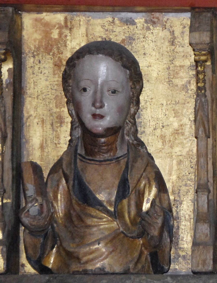 Frauenfigur des Hauptaltars St. Johannis Petersdorf auf Fehmarn